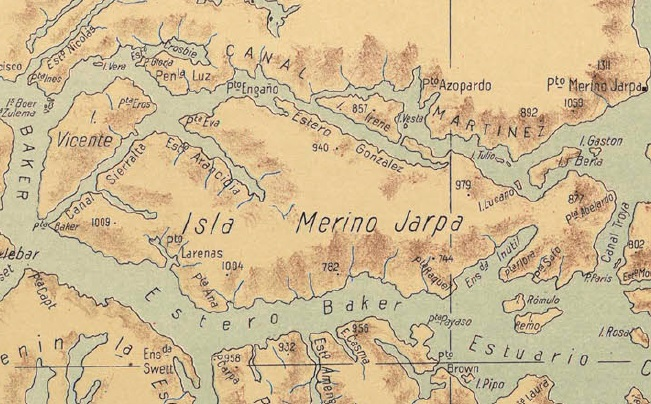 La imagen es un detalle del “Atlas Centenario”, desarrollado por la Oficina de Mensura de Tierras del Gobierno de Chile dirigida por don Luis Risopatrón con ayuda de los cartógrafos Nicanor Boloña y Luis Ossandón. Esta obra fue desarrollada por orden del Presidente de la República don Pedro Montt y publicada en el año del centenario de la república en 1910.